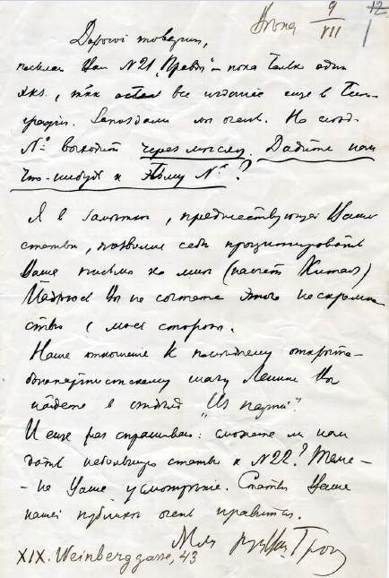 Письмо Л.Д. Троцкого М.Н. Покровскому с просьбой прислать статью для газеты Правда. Вена. 9 июля 1913 (?) года. "Дорогой товарищ. Посылаю Вам № 21 «Правды». Следующий номер выходит через месяц. Дадите ли нам что-нибудь к этому номеру? ...Наше отношение к последнему открыто бонапартистскому шагу Ленина Вы найдете в статье «Из партии». Еще раз просим о статье в №22... Статьи Ваши нашей публике очень нравятся. Жму руку, Н. Троцкий"